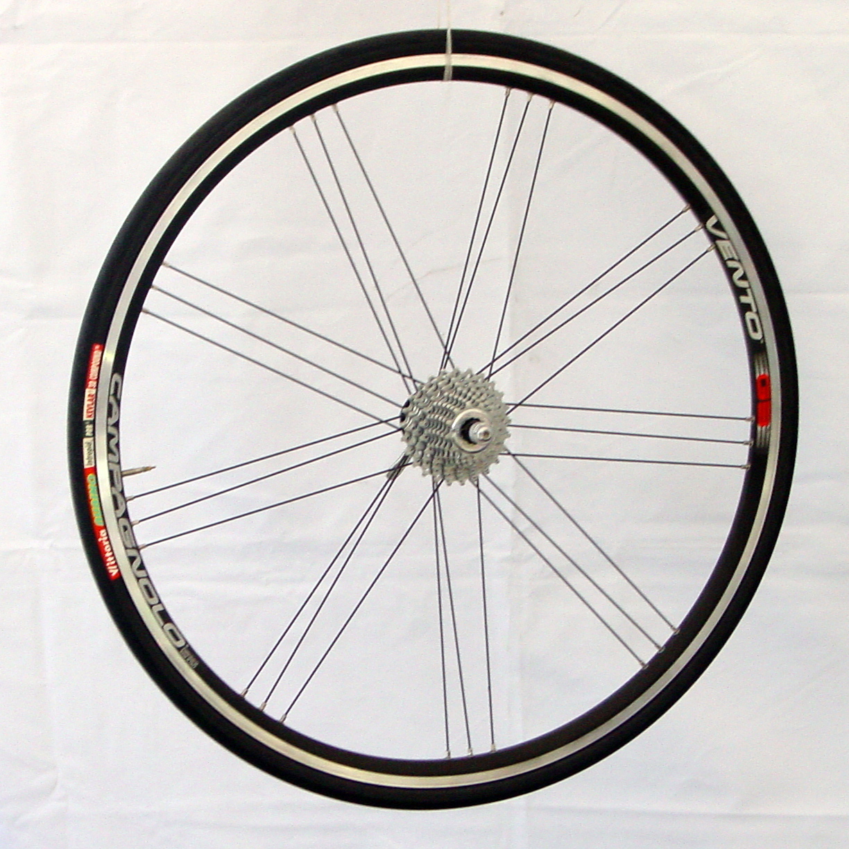 Fahrradtechnik